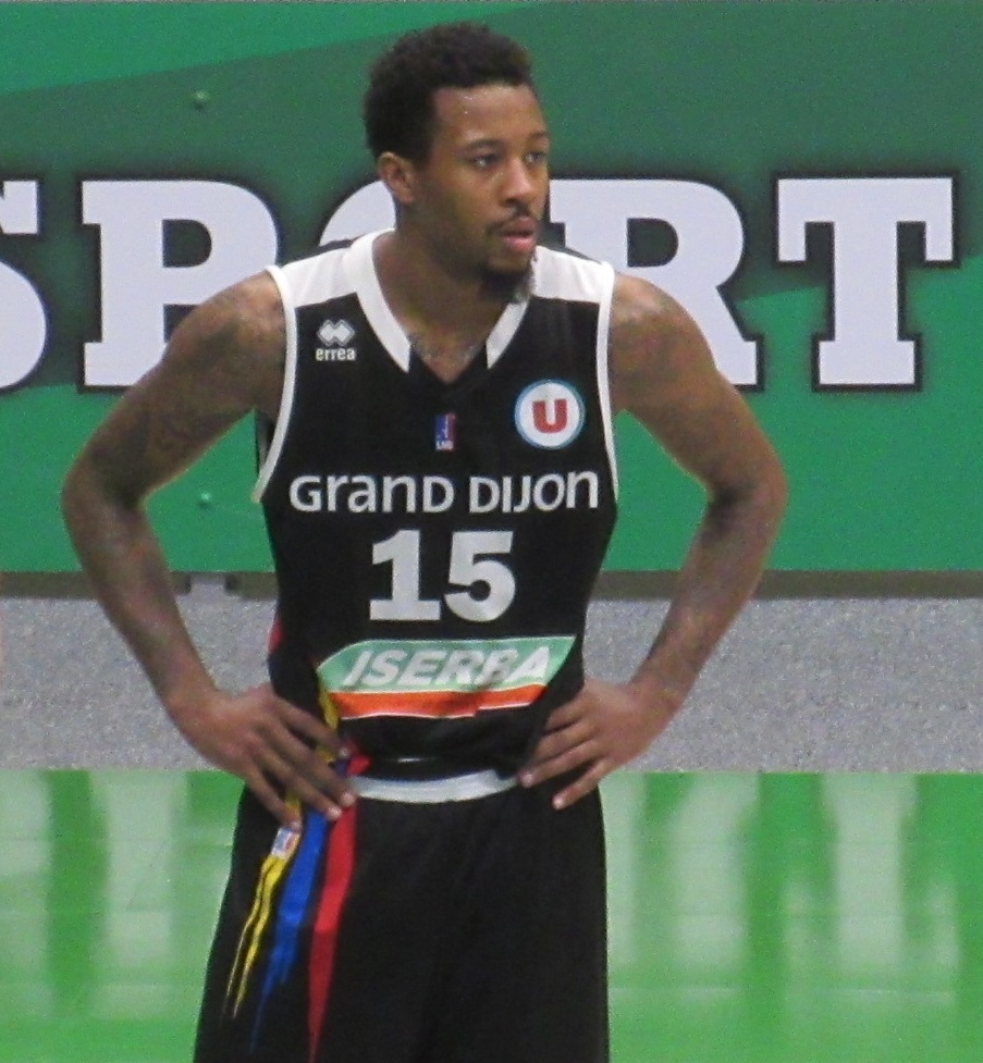 Isaiah Miles avec le maillot de Dijon